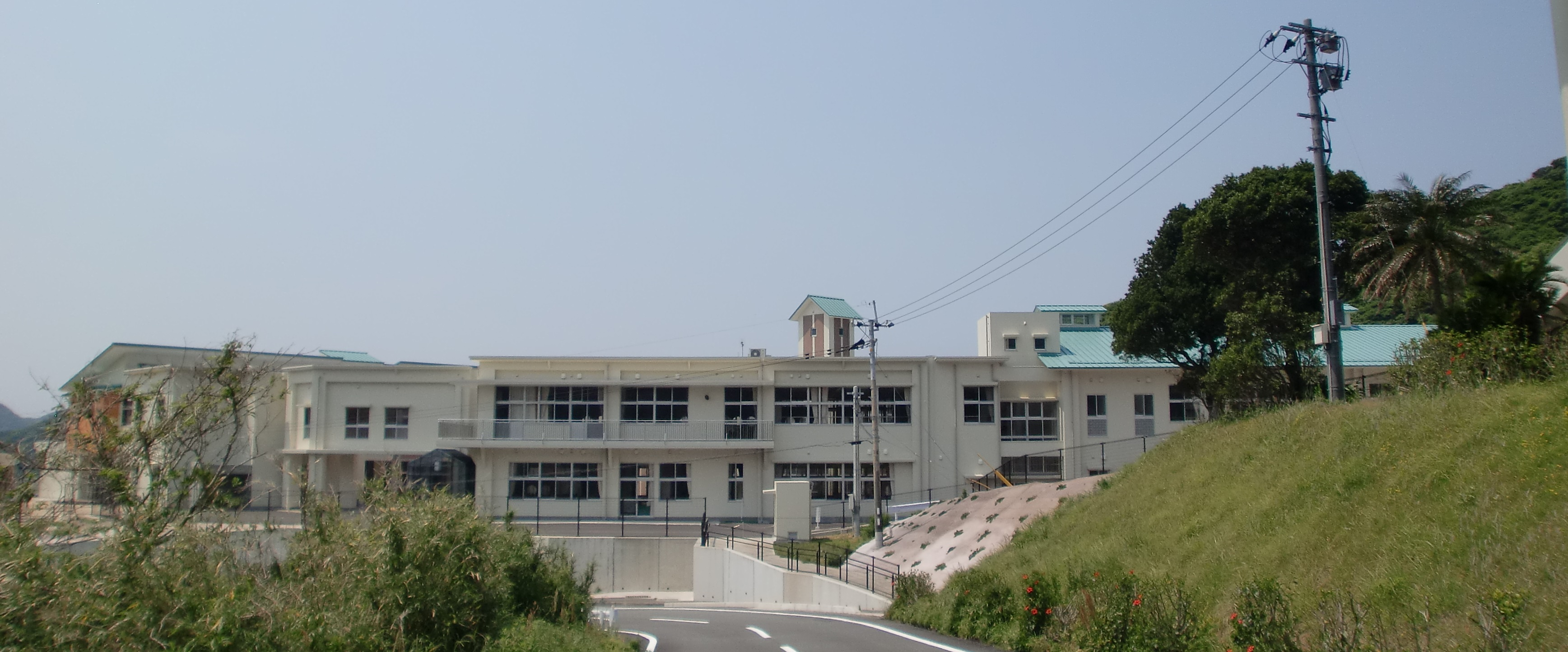 南さつま市立坊津学園（南さつま市立坊津学園小学校・南さつま市立坊津学園中学校）の校舎を裏手側から撮影。（表側からは部外者立ち入り禁止となっており撮影不可能）